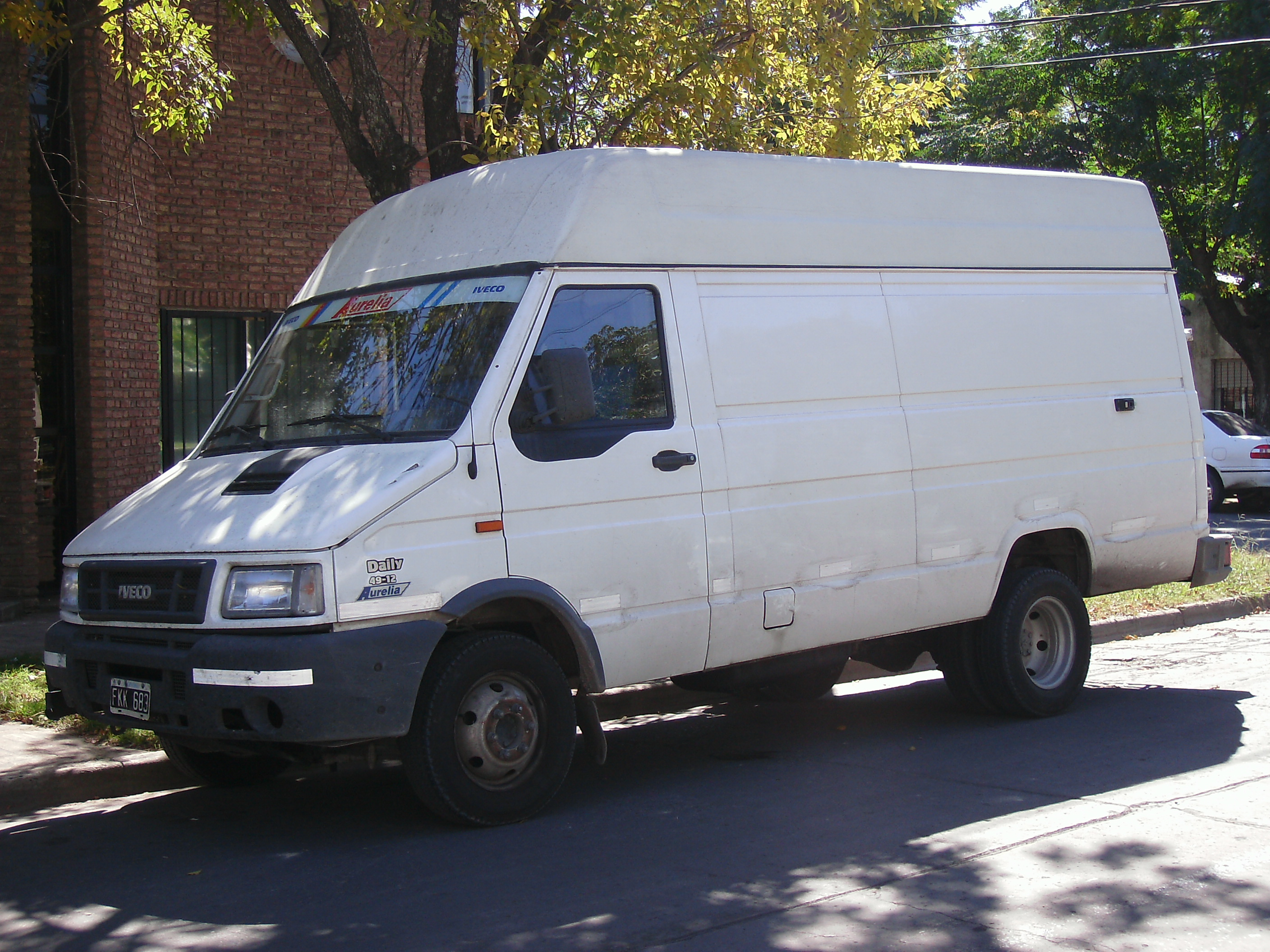 Iveco Daily 49-12 Aurelia segunda generación.